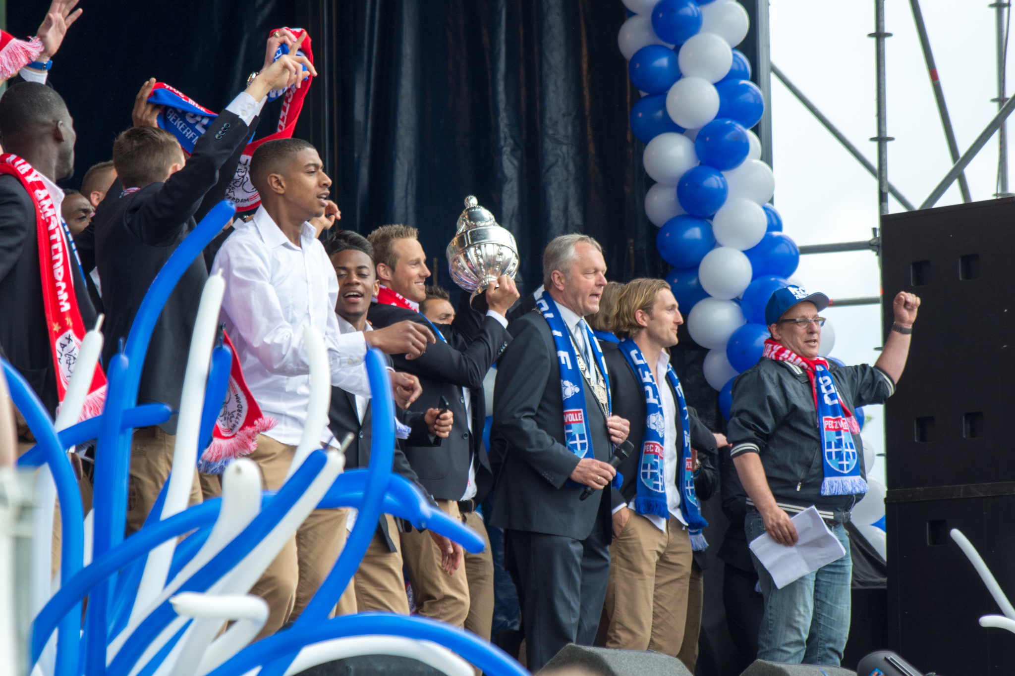 Deel van de selectievan PEC Zwolle tijdens de huldiging na het behalve van de KVB Beker